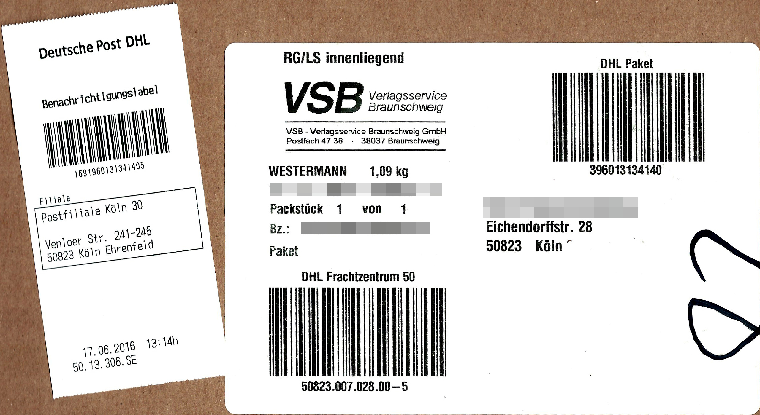 Paketaufkleber DHL-Paket. Das Paket konnte dem Empfänger nicht zugestellt werden. Es erhielt ein Benachrichtigungslabel mit dem Hinweis, in welcher Filiale das Paket hinterlegt wurde.